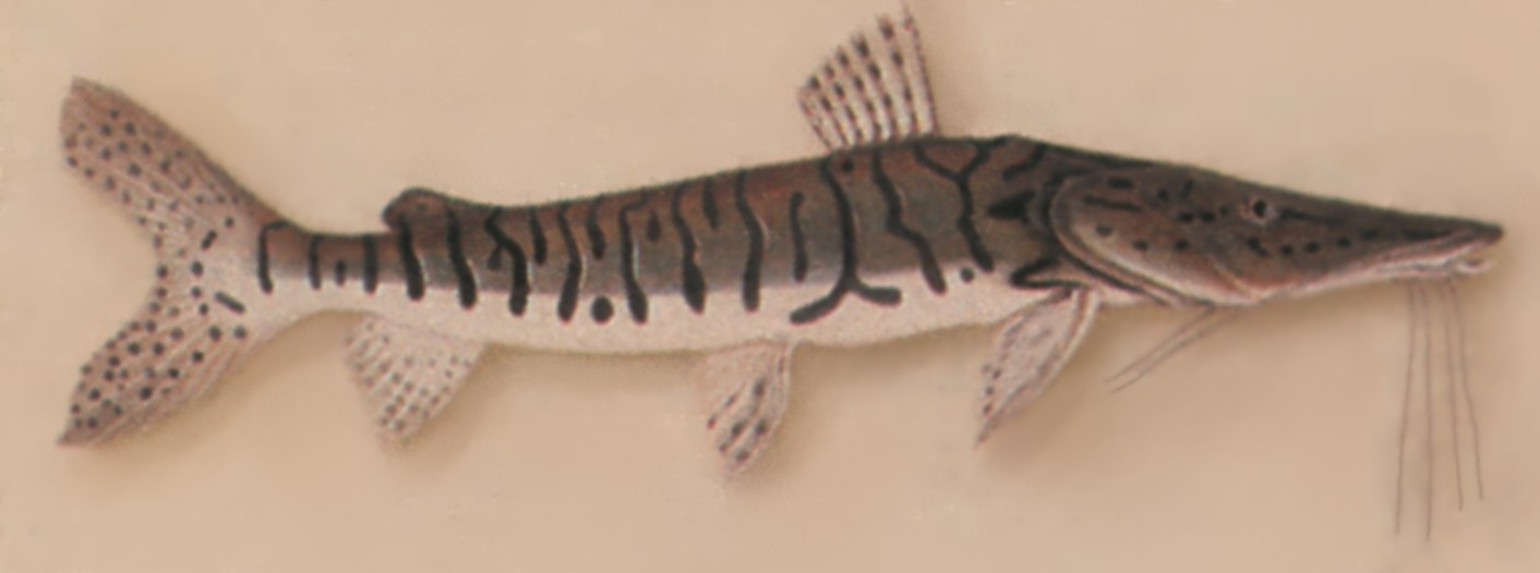 Desenho de um surubim (Pseudoplatystoma fasciatum), por Johann Natterer, parte da missão ao Brasil de naturalistas do imperador austríaco Francisco I, de 1817 a 1835